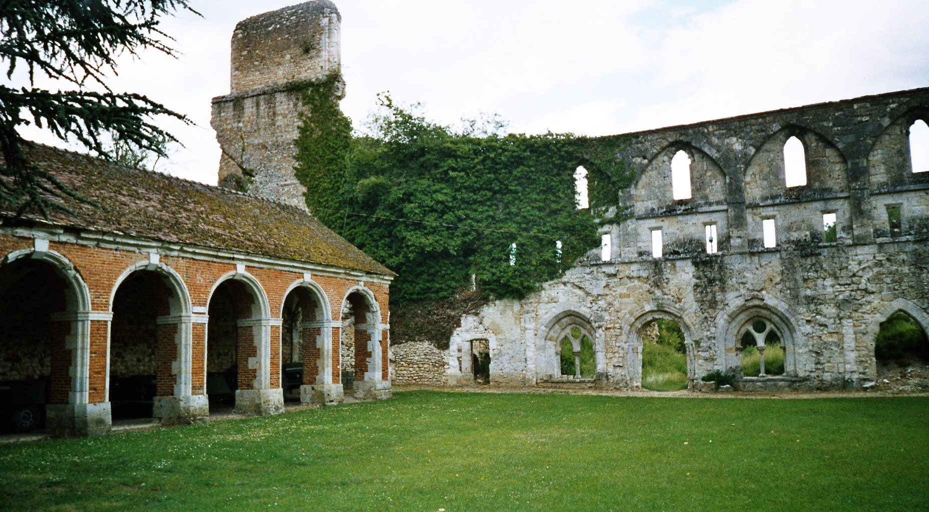 Abbaye de Mortemer, Lisors, Eure, Normandie Monasteries in France.